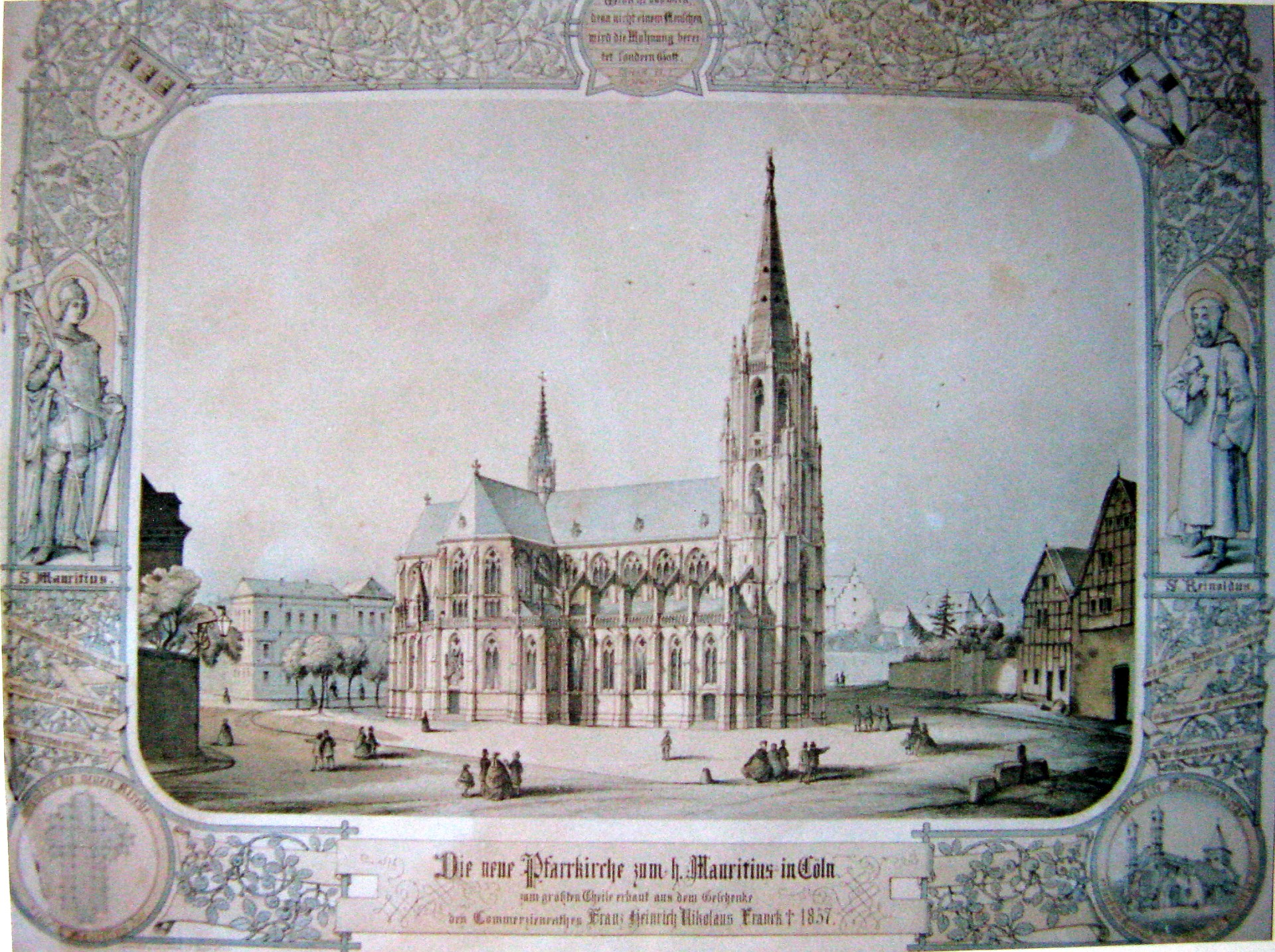 Die neugotische Kirche St. Mauritius in Köln, deren Bau durch eine Spende des Commerzienrates Franz Heinrich Nikolaus Franck ermöglicht wurde. Im Bild unten rechts die Kirche aus dem 12. Jhd.